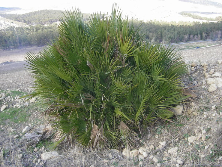 Palma nana (Chamaerops humilis) nella montagna della Ganzaria (Sicilia).